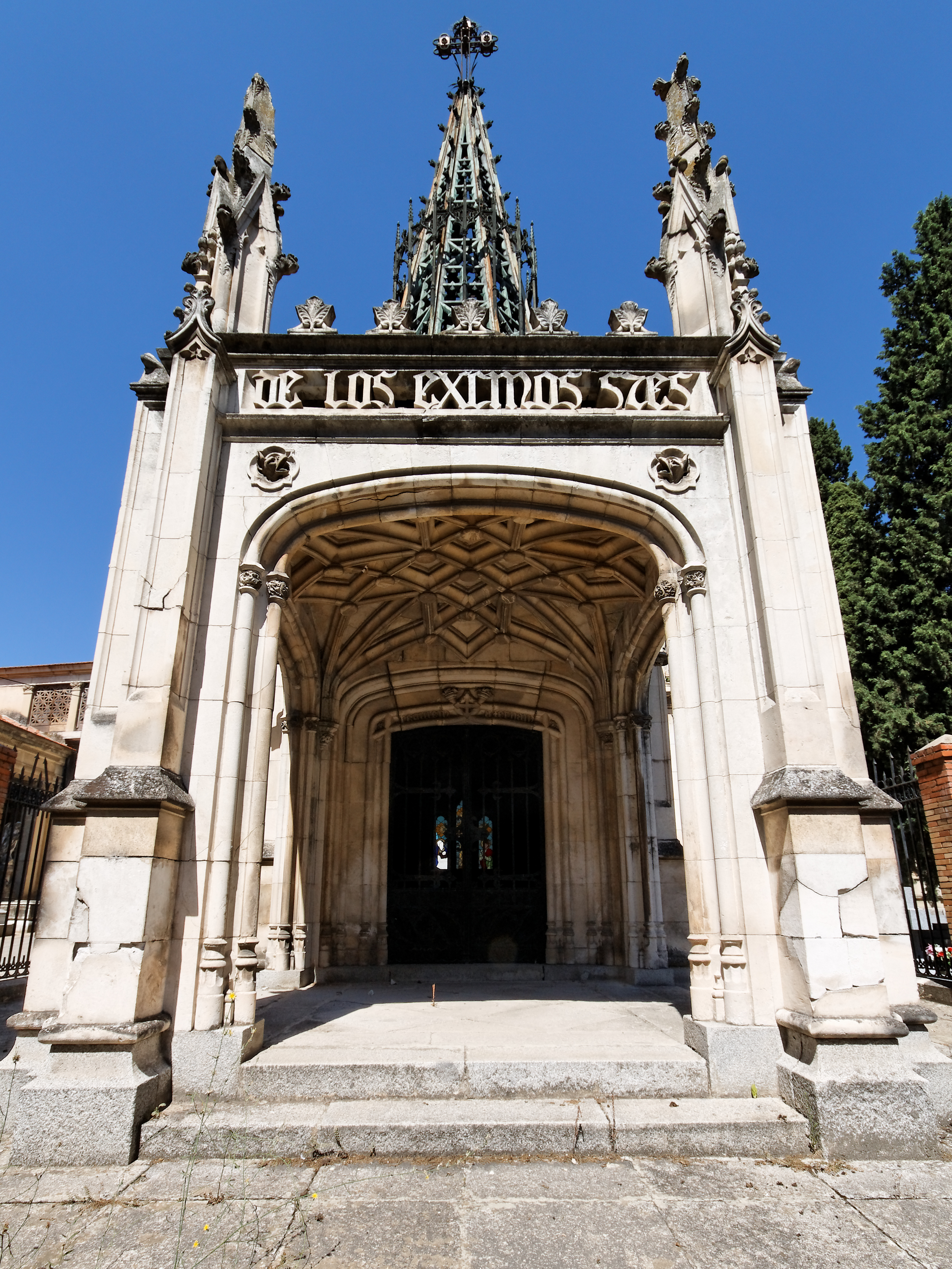 Cementerio de la Sacramental de San Isidro, Madrid. Panteón de los marqueses de Amboage. Obra de Arturo Mélida (1849-1902)